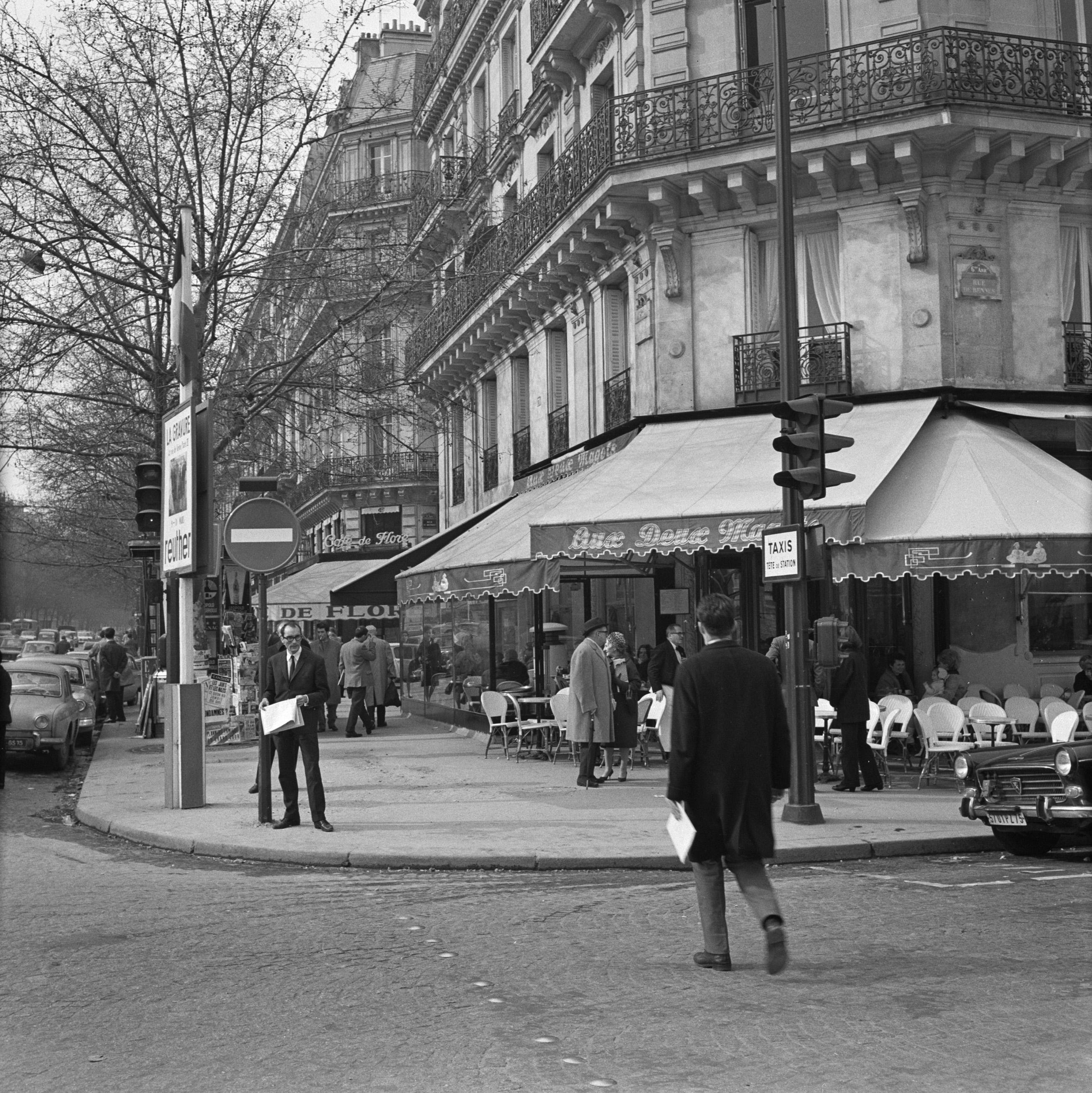 Collectie / Archief : Fotocollectie Van de Poll Reportage / Serie : Pariser Bilder [Het straatleven van Parijs] Beschrijving : Café-restaurants in Saint-Germain-des-Prés Annotatie : Wijk in het zesde en zevende arrondissement van Parijs, van oudsher bevolkt door kunstenaars, studenten en intellectuelen Datum : 1965 Locatie : Frankrijk, Parijs Trefwoorden : cafés, straatbeelden, terrassen, voetgangers Instellingsnaam : Saint-Germain des Prés Fotograaf : Poll, Willem van de Auteursrechthebbende : Nationaal Archief Materiaalsoort : Negatief (6x6) Nummer archiefinventaris : bekijk toegang 2.24.14.02 Bestanddeelnummer : 254-0633